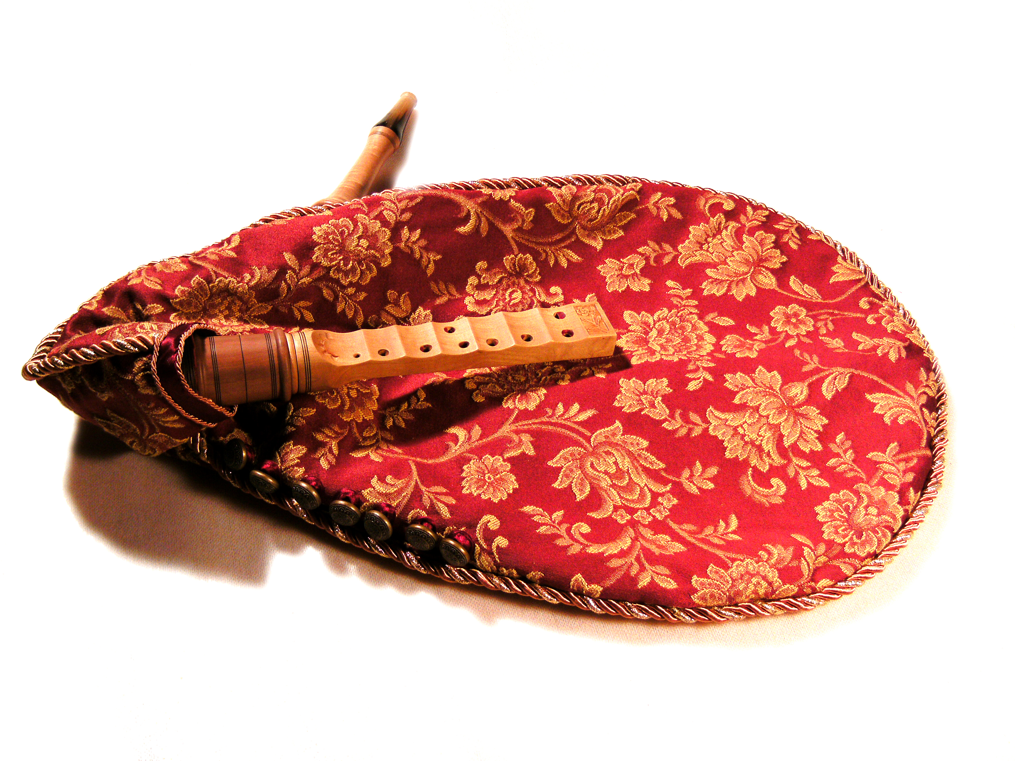 Ceccola in G (Sol) W. Rizzo, P. Rabanser 2010